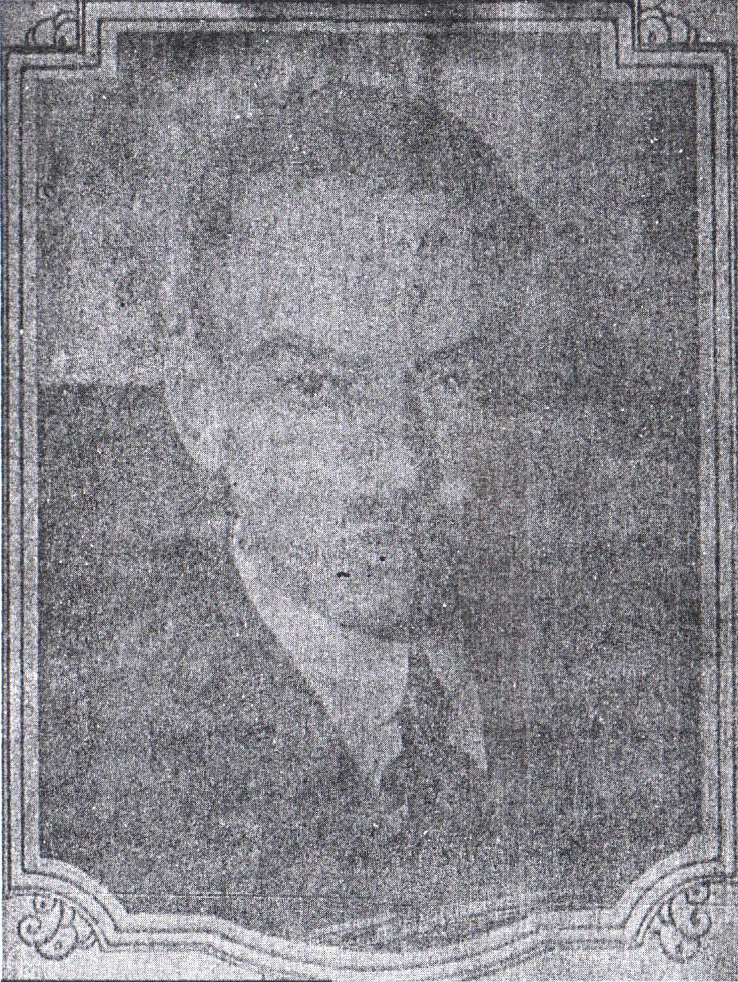 Fotografía Excelsio 1929 Primo Villa Michel